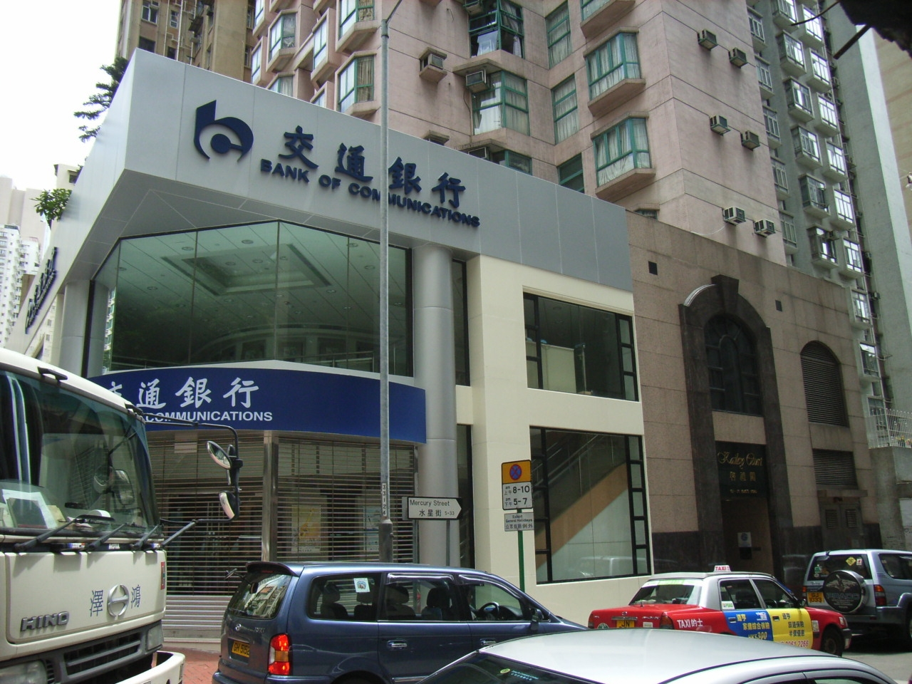 Street in Tin Hau district, Hong Kong User:Tin Ho SP Lim